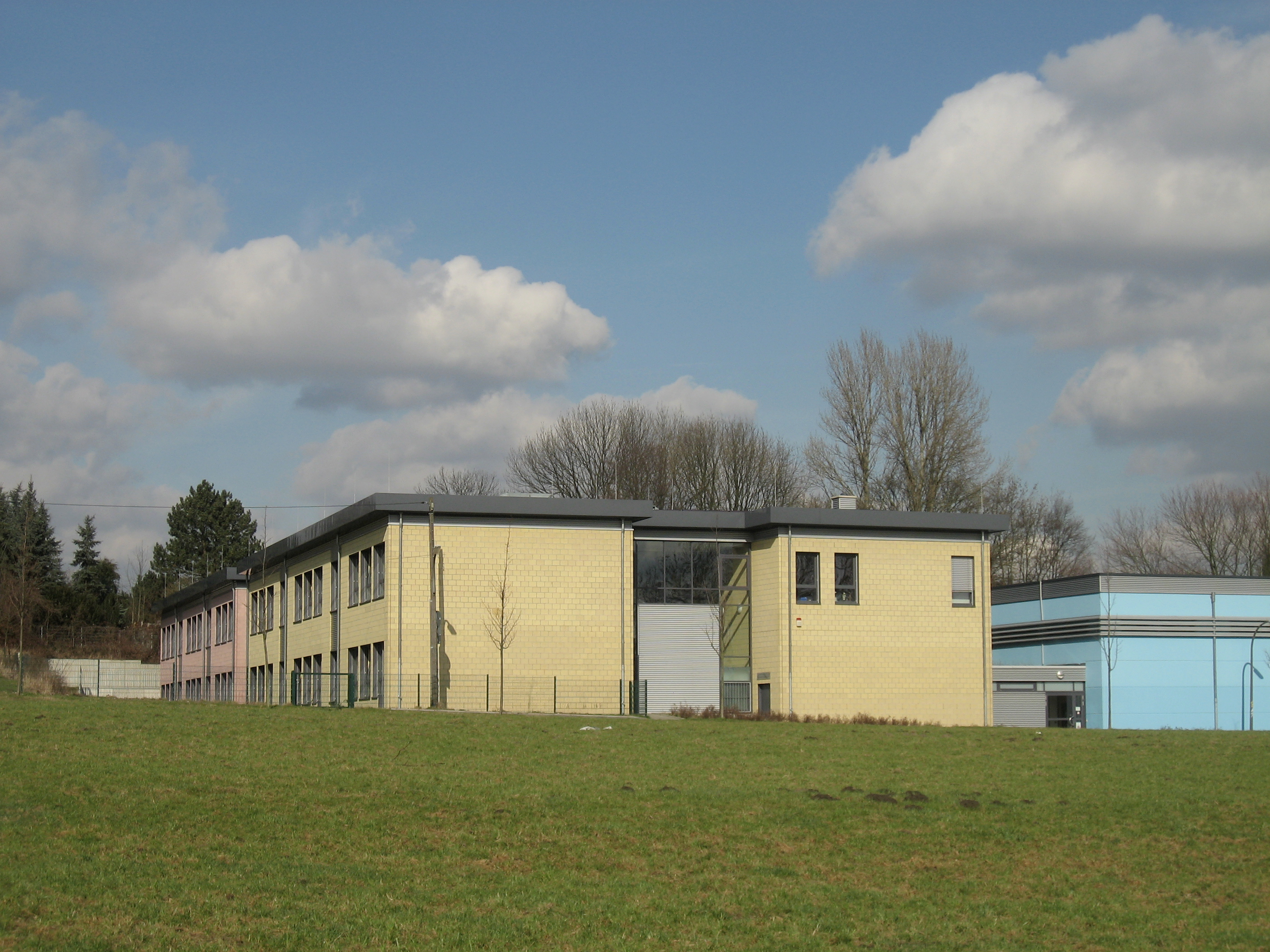 Barop an der Ostenberg-Schule